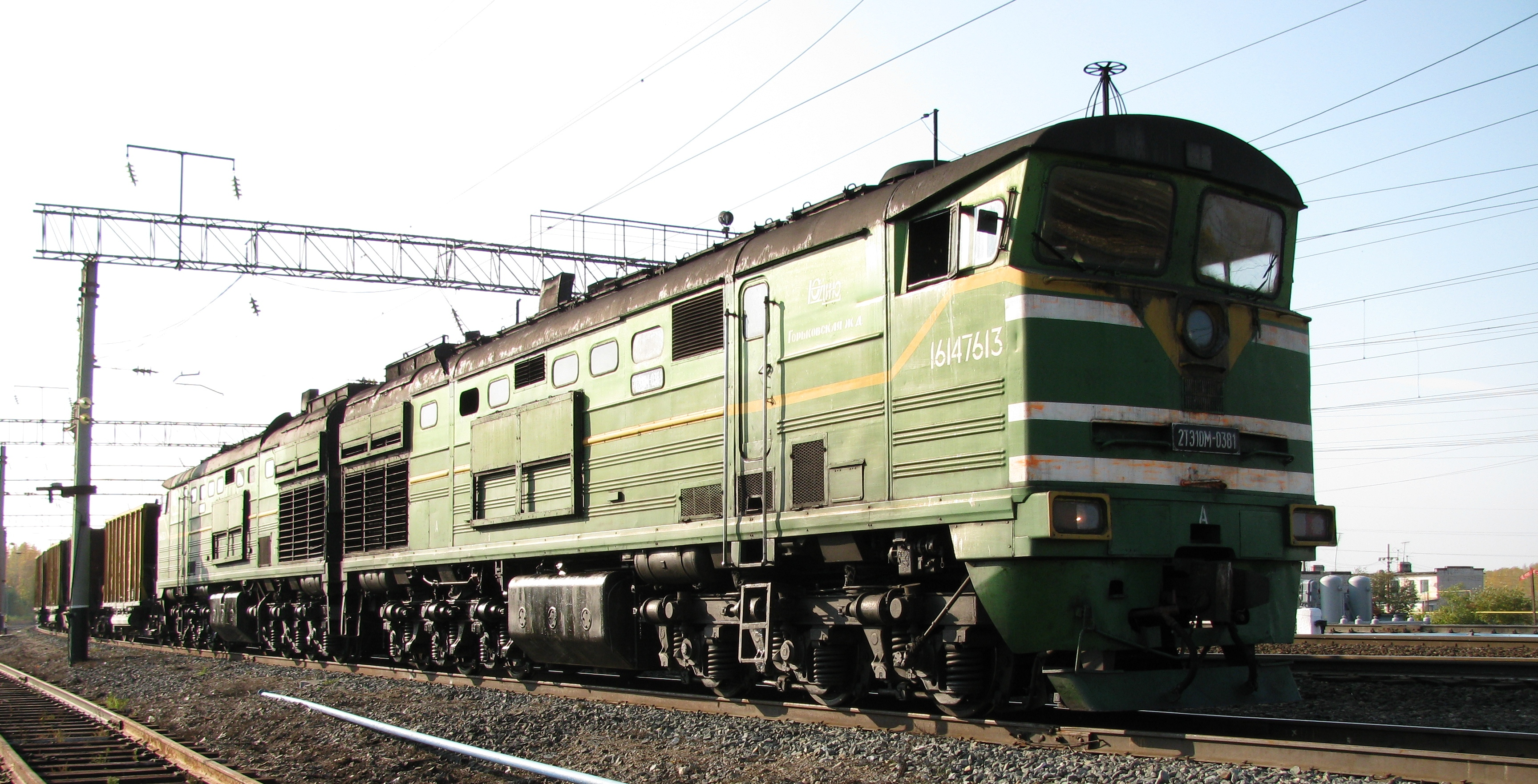 Тепловоз 2ТЭ10М-0381